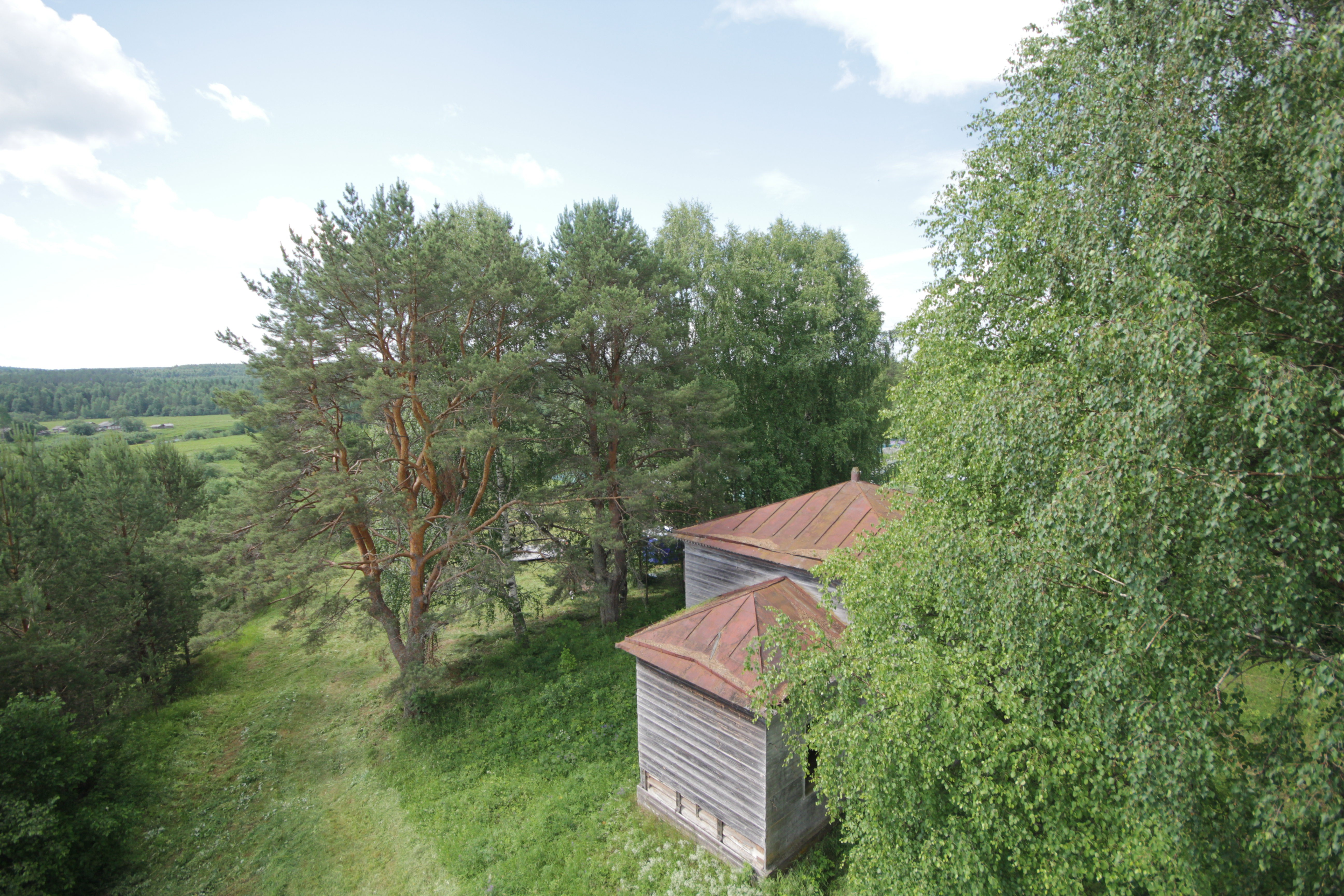 Колокольня, Никольская церковь: Андричевская, Вельский район, Архангельская область